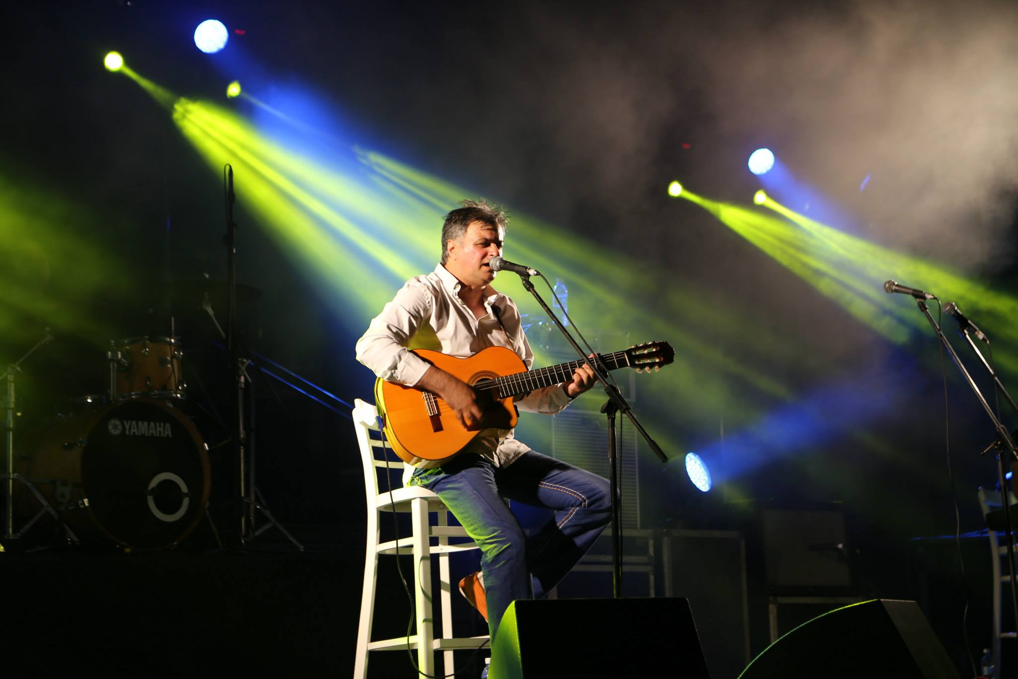 משה להב בהופעה